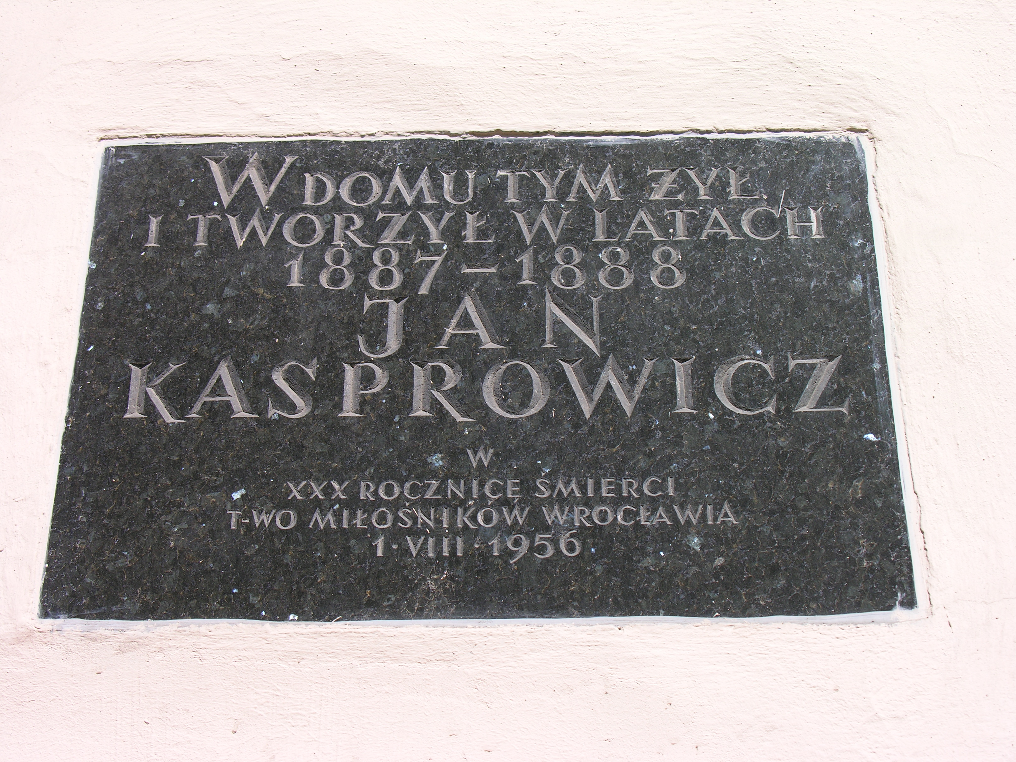 Tablica pamiątkowa ku czci Jana Kasprowicza przy ul. Cybulskiego 17 we Wrocławiu